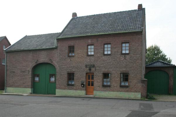 Pfadfinderheim in Wegberg-Gerichhausen